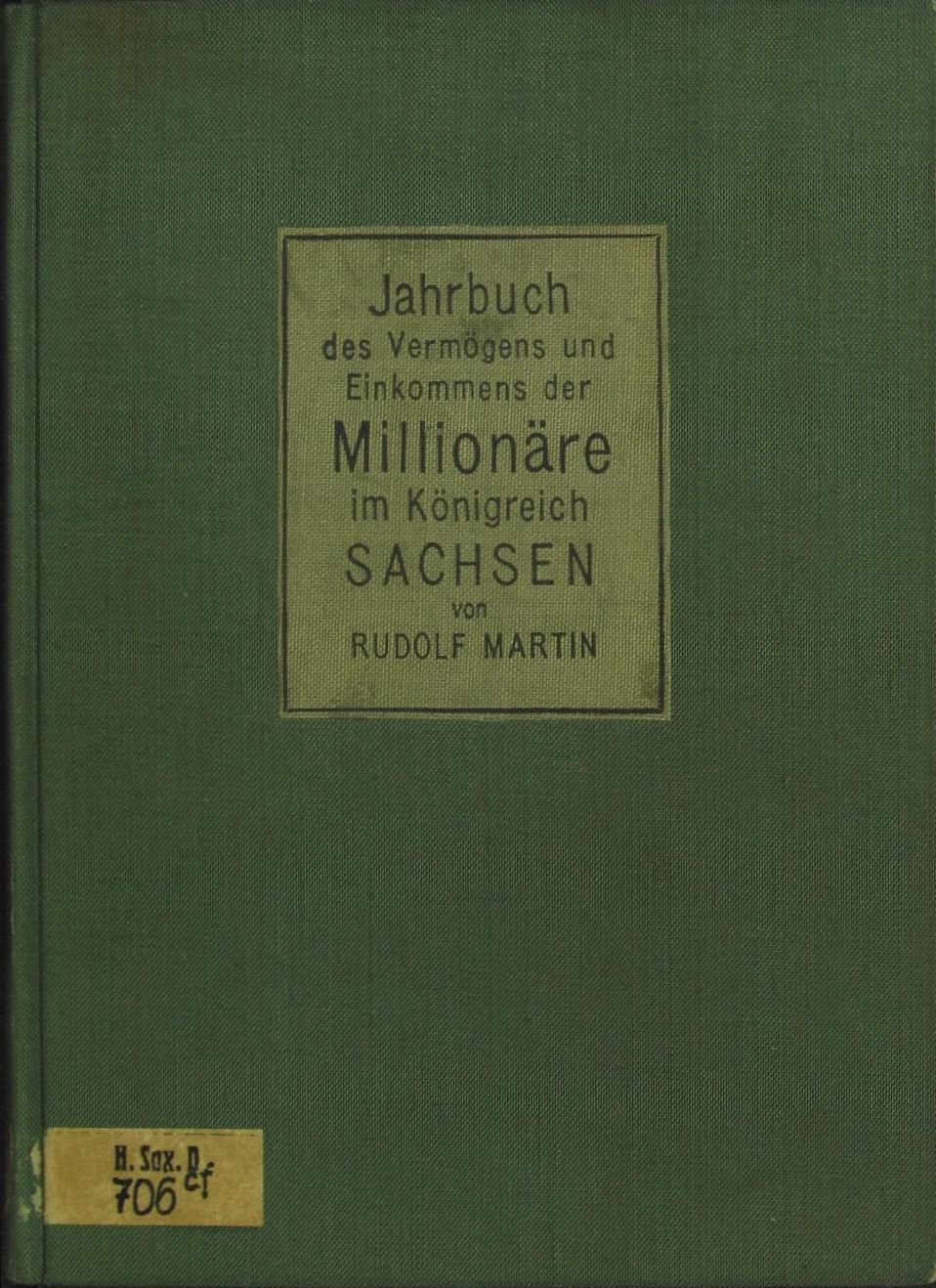 Das Jahrbuch des Vermögens und Einkommens der Millionäre erschien von 1912 an … Das Jahrbuch des Vermögens und Einkommens der Millionäre des Königreichs Sachsen, Verlag Rudolf Martin, Berlin 1912, ist als Digitalisat in der Staats- und Universitätsbibliothek Dresden vorhanden.